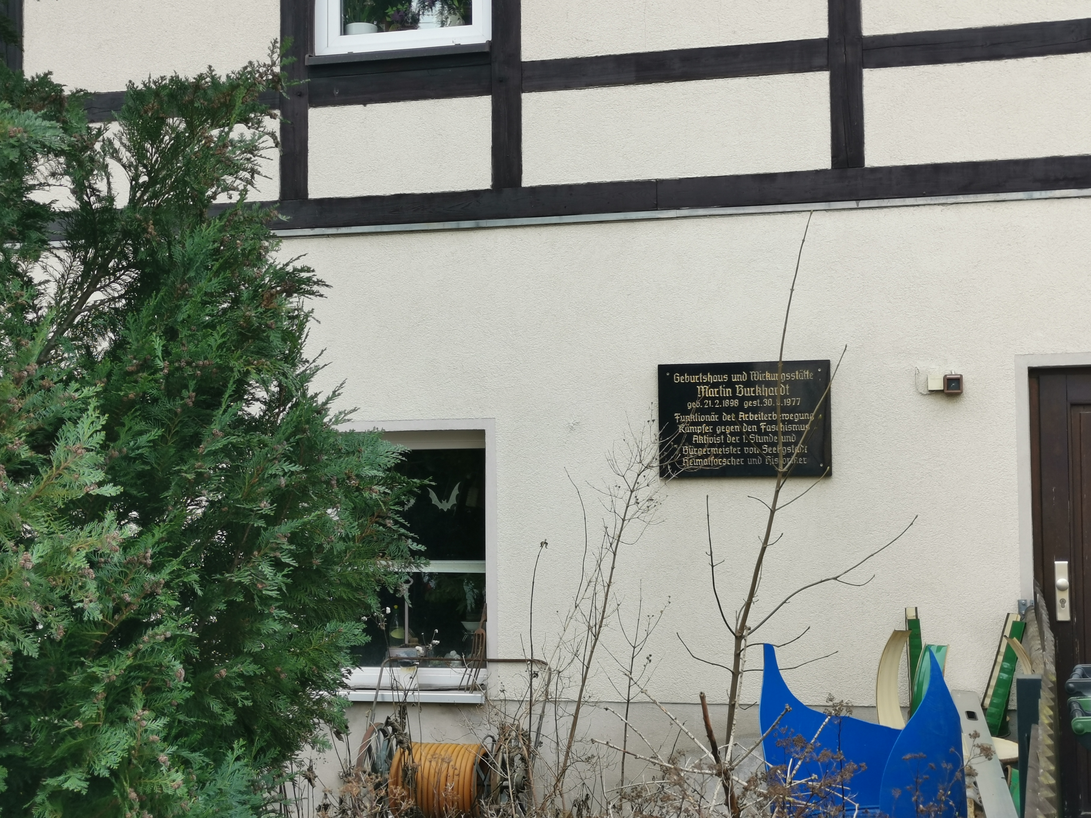 Wohnhaus von Martin Burkhardt in Johann-Joachim-Kändler-Straße 17 in Seeligstadt